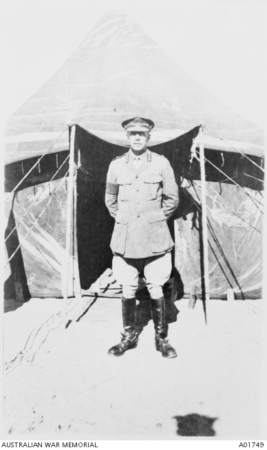 מייג'ור גנרל הנרי הודג'סון בפתח אוהל בתקופה שלפני כיבוש באר שבע